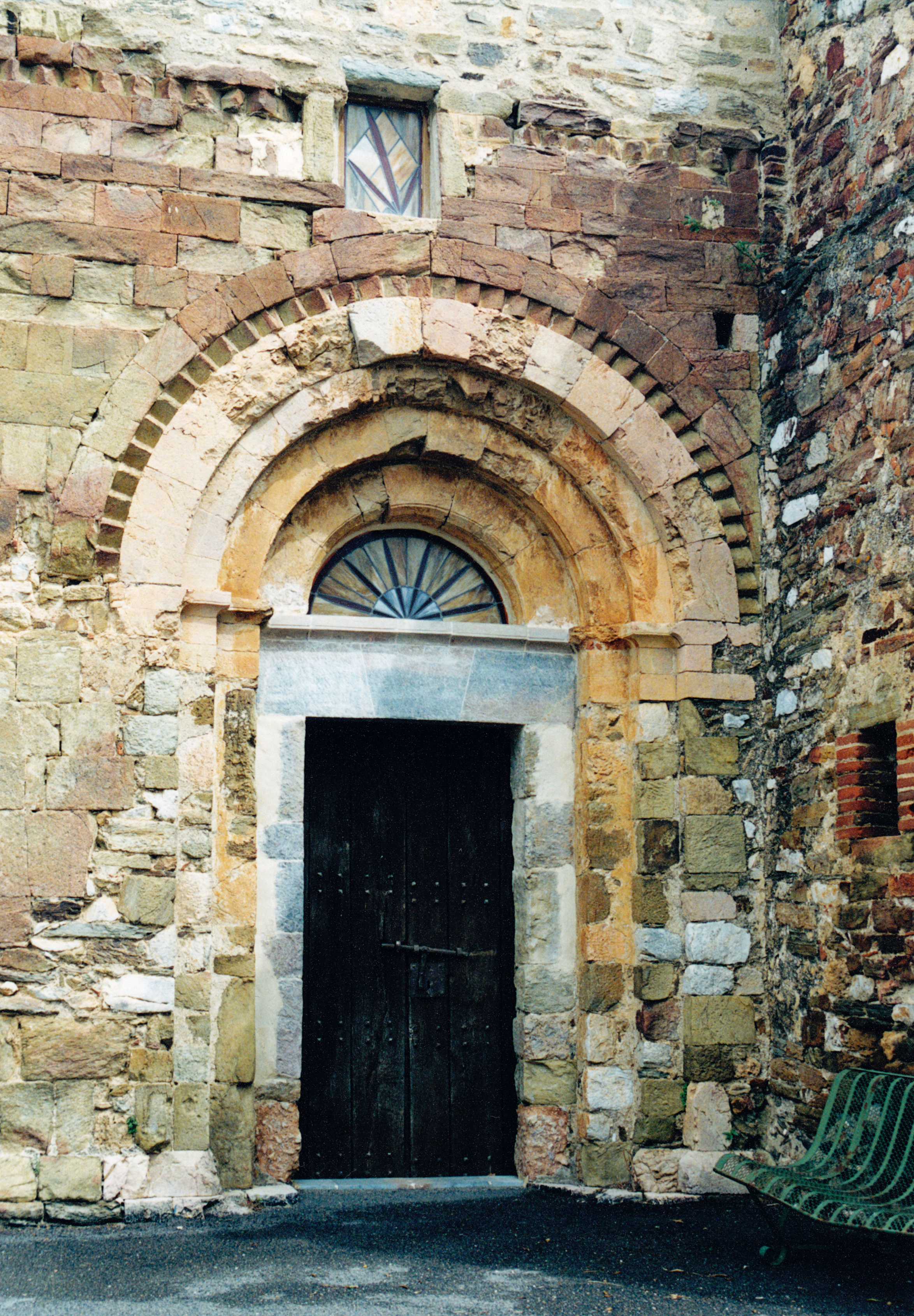 France - Pyrénées-Orientales - Aspres - Église Saint-Félix de Calmeilles